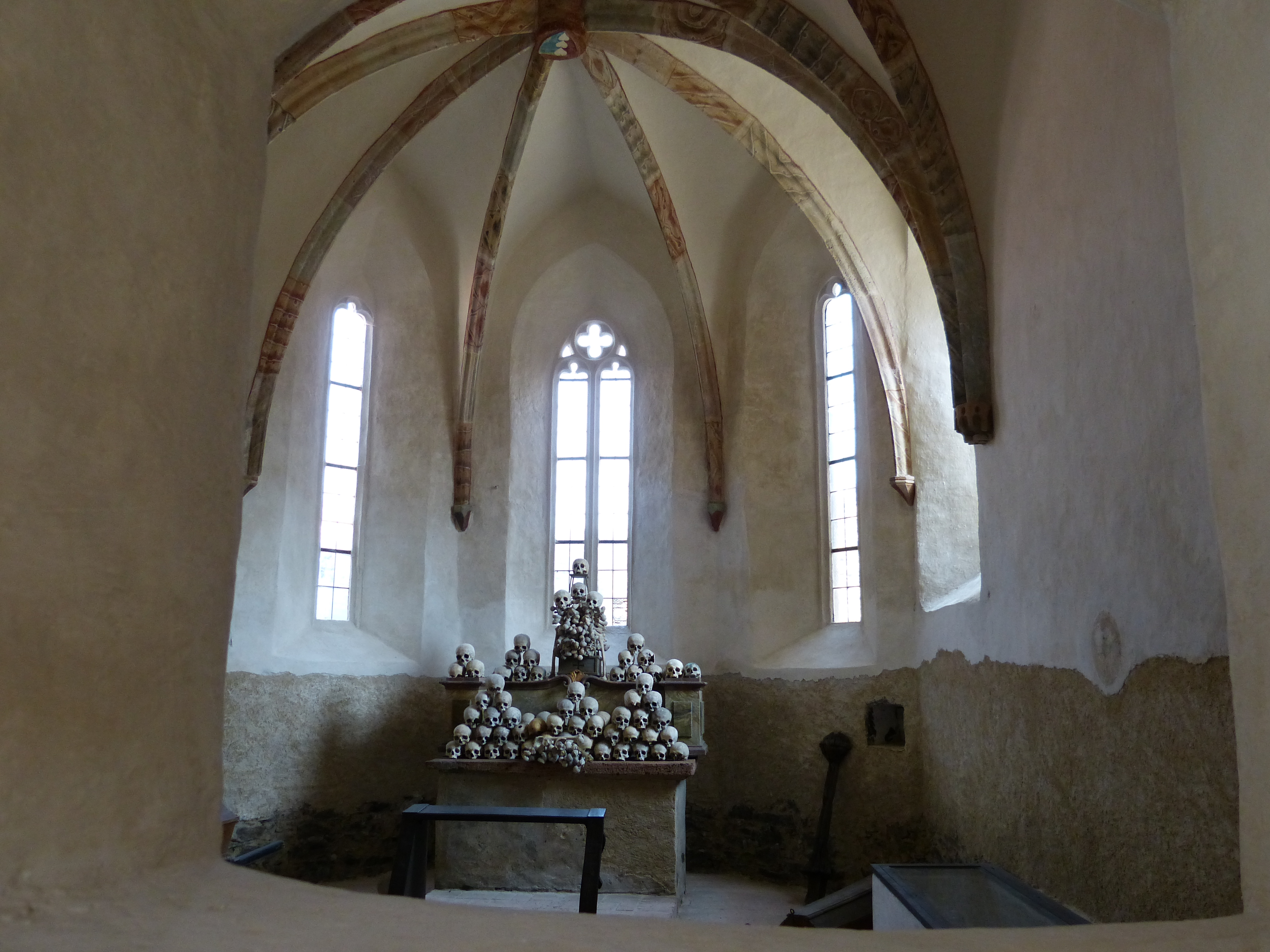 Karner bei St. Michael, Wachau